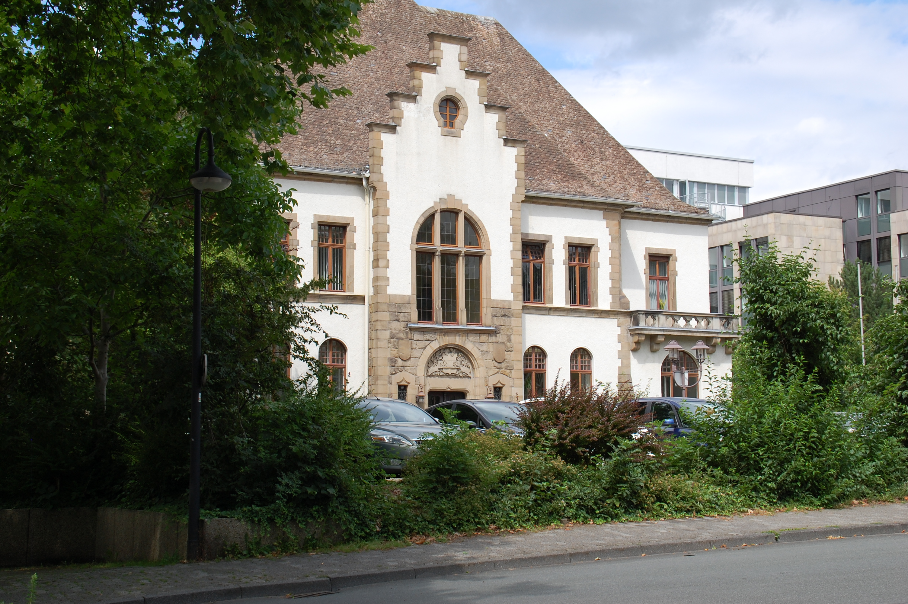 Altbau des Kreishauses in Arnsberg